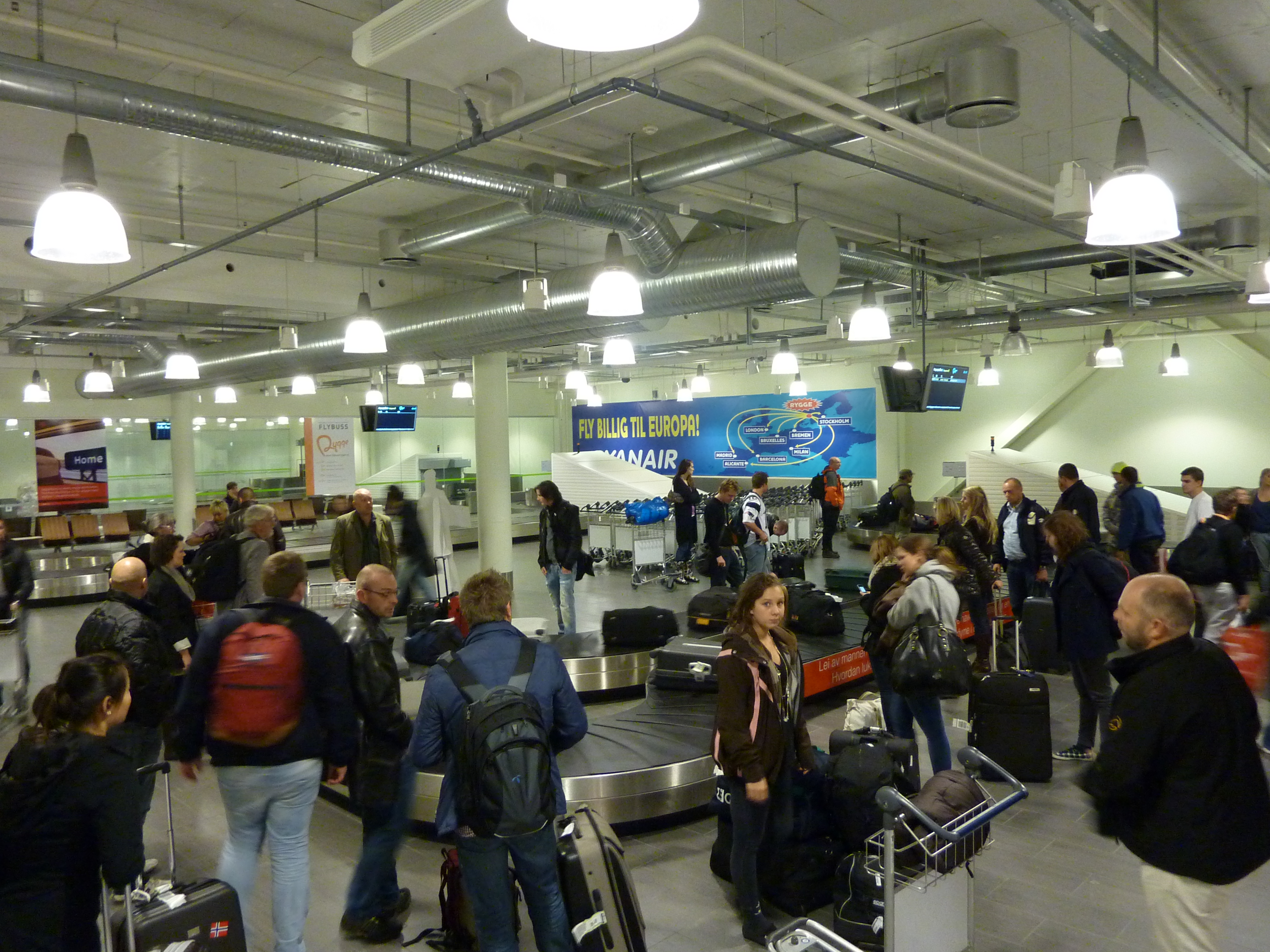 Ankomsthallen på Moss Airport, Rygge